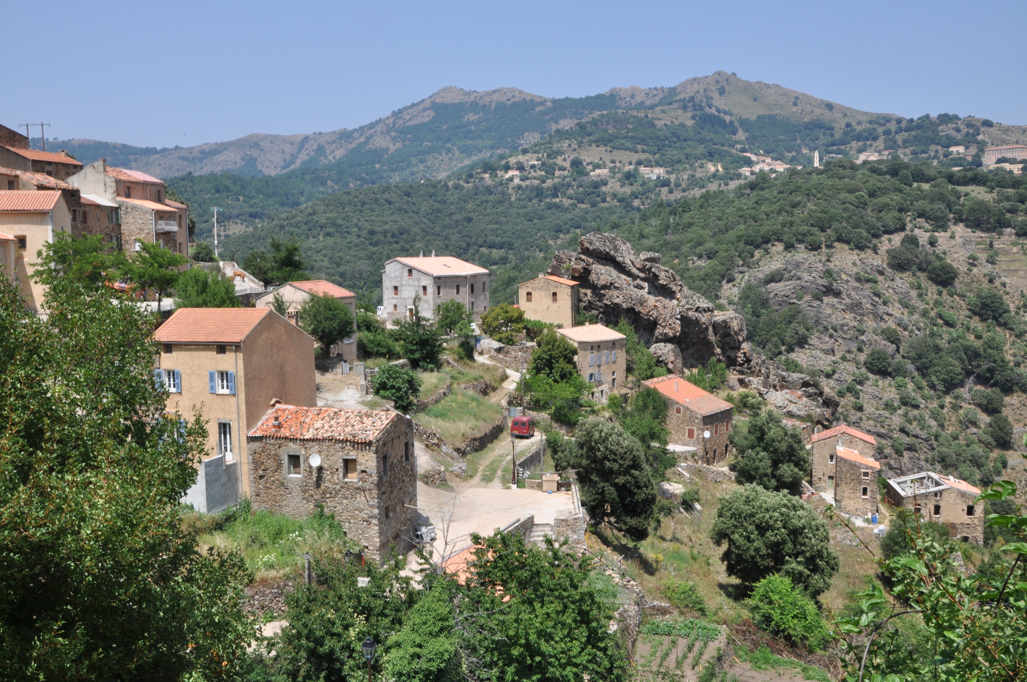 Mausoléo, some houses